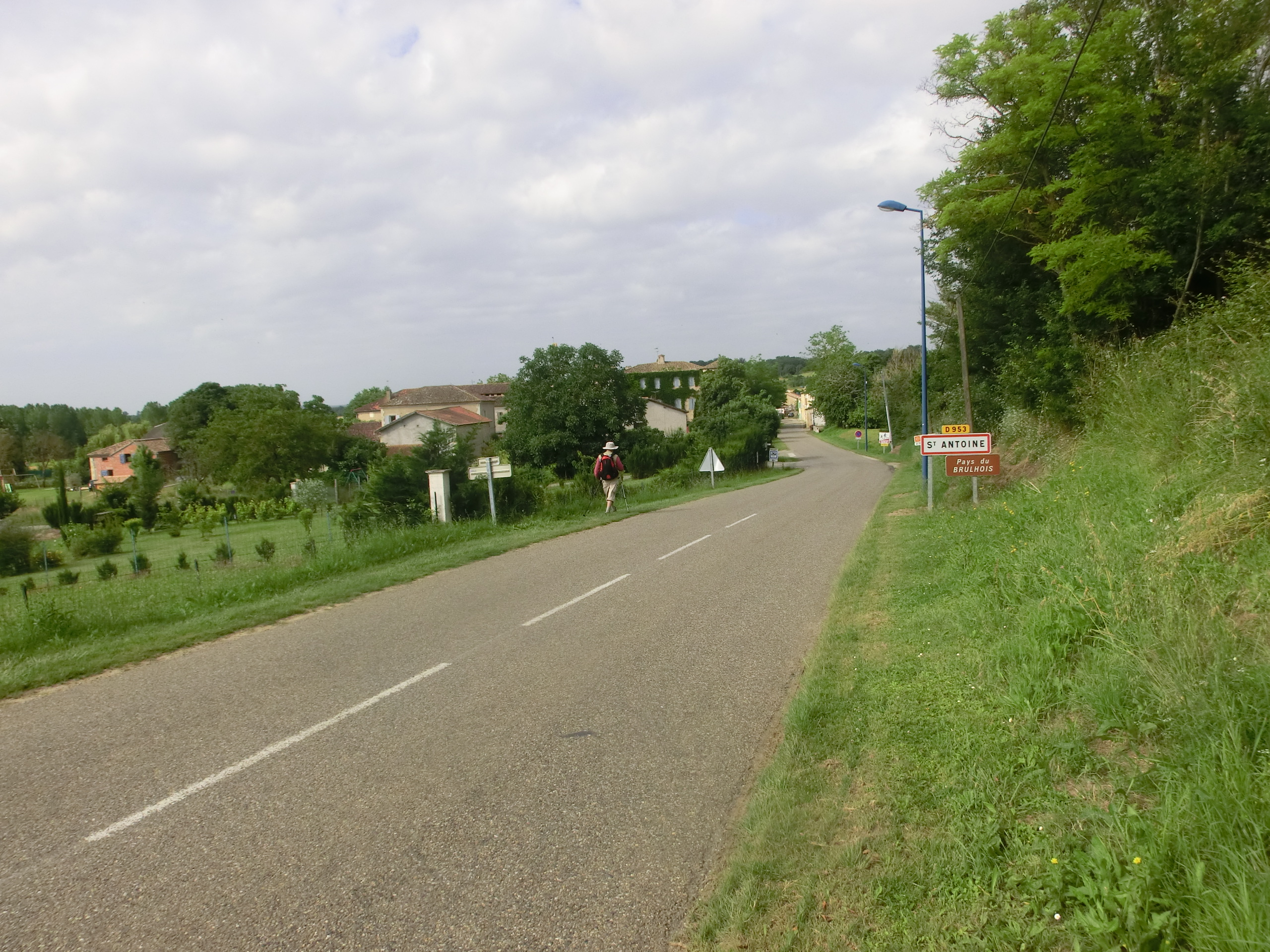 Le chemin de Compostelle.